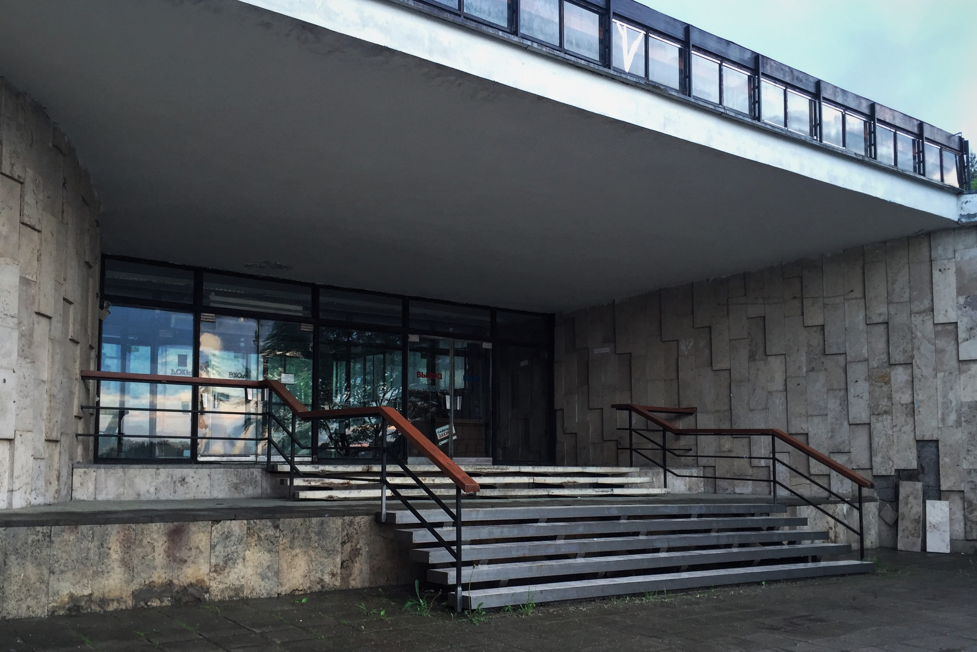 ВДНХ. Бывший павильон № 22 «Плодоовощеводство» Moscow in 2016; Москва в 2016